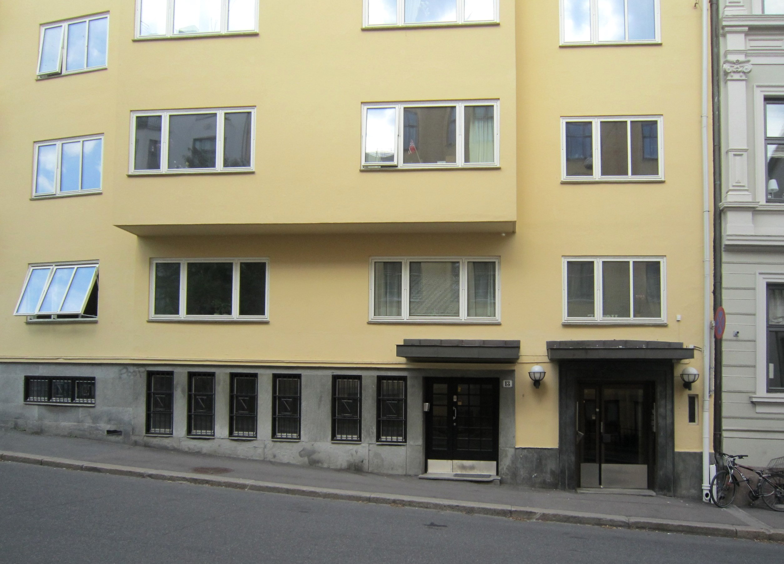 Uranienborgveien 13. Arkitekt: Hjalmar S. Bakstad (1936). Her var i sin tid Krølle kro.